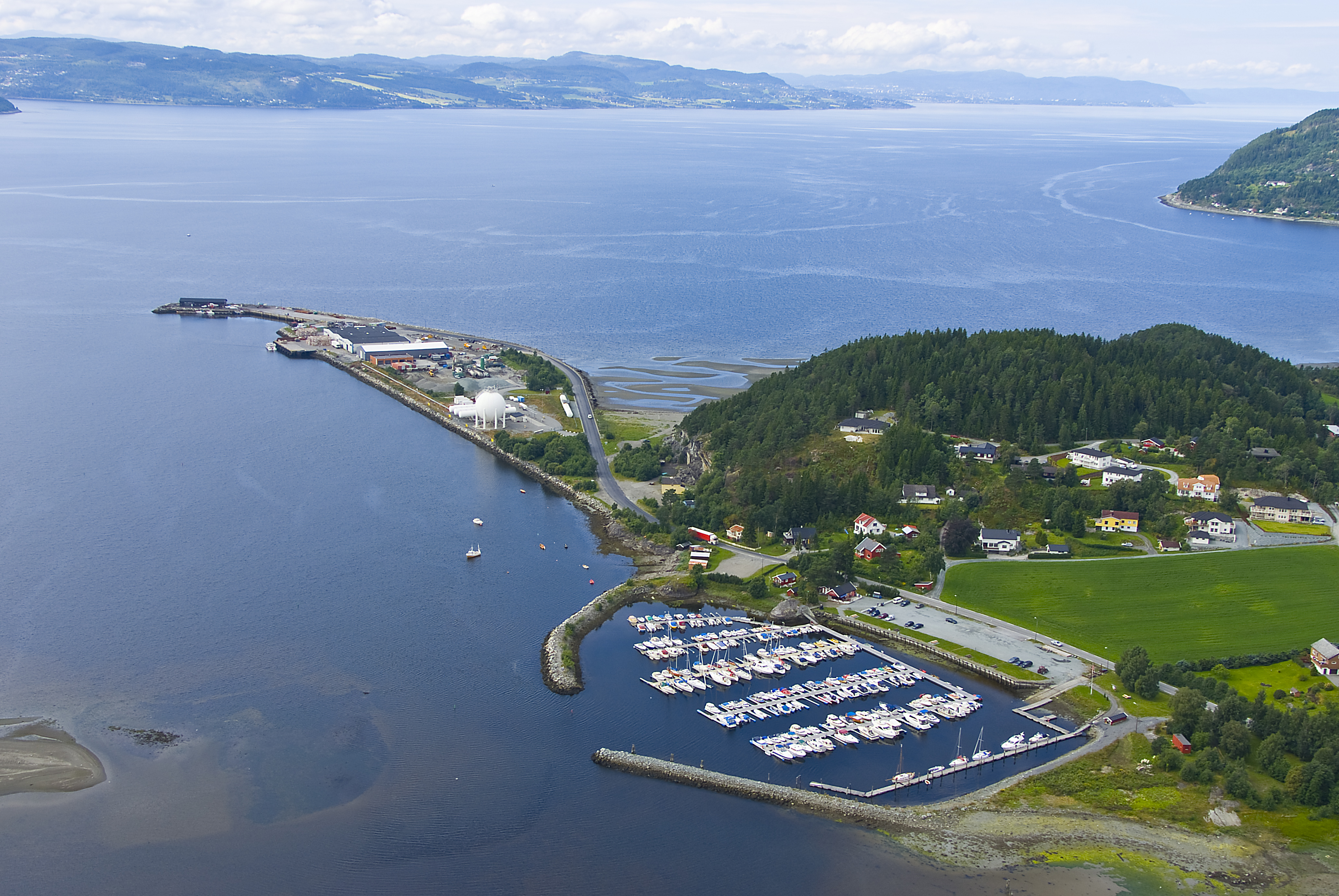 Foto: Trondheim Havn/Åge Hojem